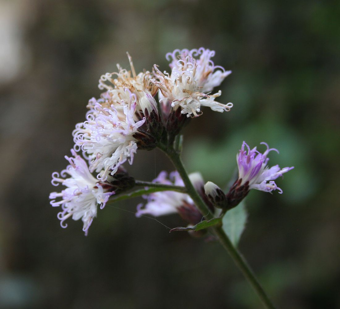 Acilepis saligna (= Vernonia saligna), Korbblütler (Asteraceae) - Vietnam/Việt Nam: Dorf Cán Cấu nördlich von Bắc Hà (Prov. Lào Cai)